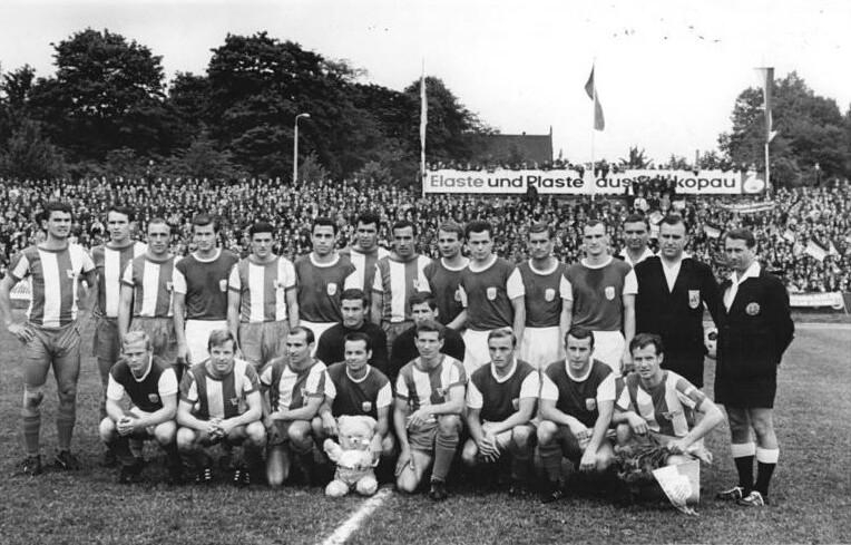 Zentralbild-Schaar wen. 12.6.1968 Halle: 17. FDGB-Pokal-Finale im Fußball. 1. FC Union Berlin gegen FC Carl Zeiss Jena 2:1 am 9.6.1968. Die beiden Mannschaften, Union Berlin im schwarz-weiß gestreiften Jersey und Jena im schwarzen Jersy mit weissen Ärmeln, vor Beginn des Spiels im Kurt-Wabbel-Stadion.